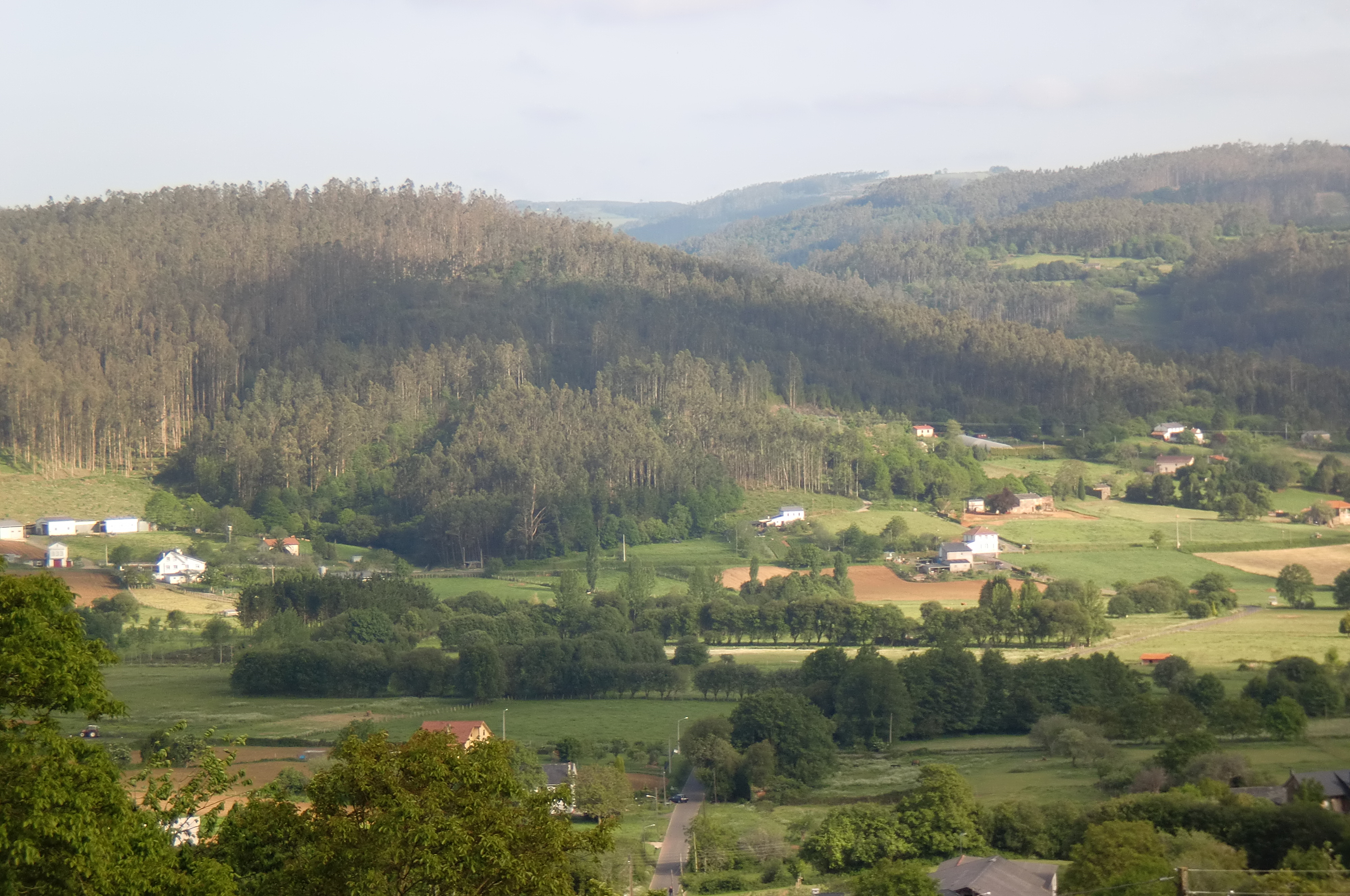 San Xoán de Moeche